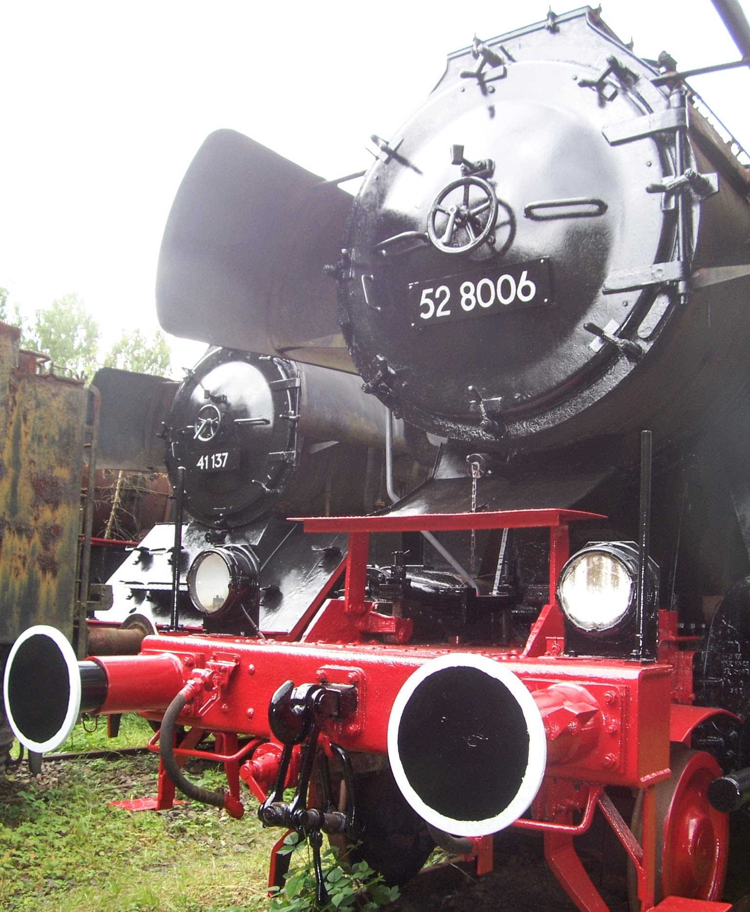 Dieses Bild zeigt die Dampfloks 41 137 und 52 8006 im Dampflokmuseum Hermeskeil in teilrestauriertem Zustand.